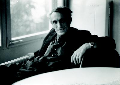 Marcel-Paul Schützenberger à Oberwolfach (1972)